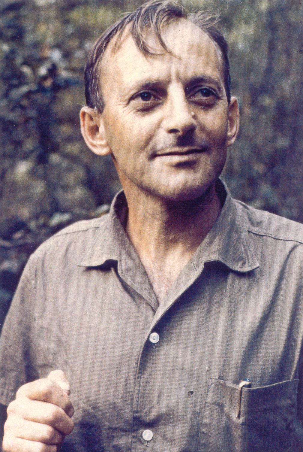 Zdjęcie zrobione przez p. Helenę Malkin, przedstawia jej męża - podróżnika, etnografa i entomologa Borysa Malkina